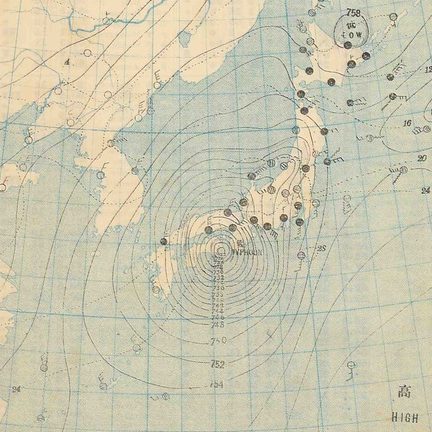 1934年9月21日（金）のアジア太平洋地上天気図